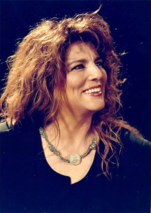 יונה אליאן